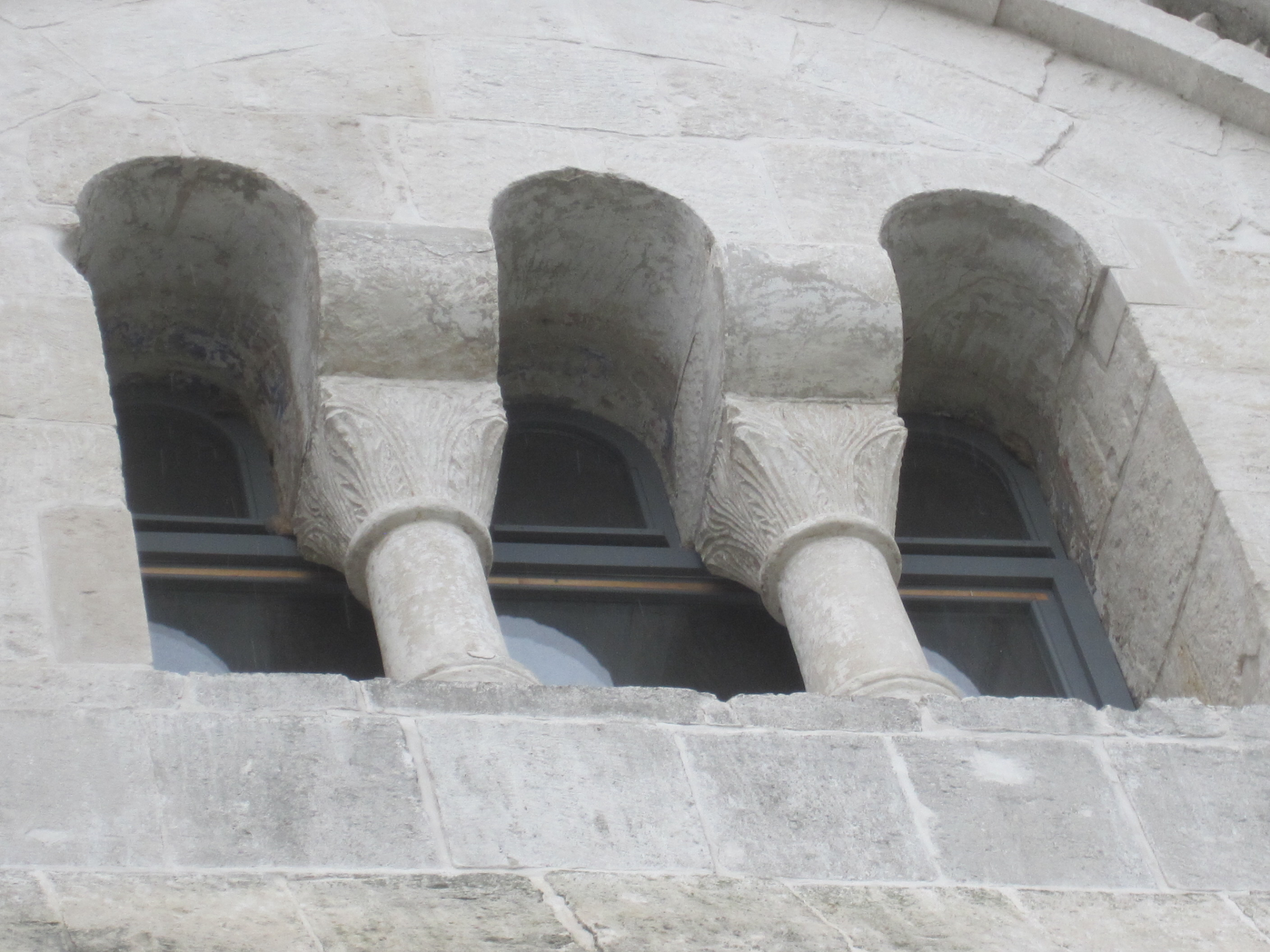 arcades de la tour du château de Bogolioubovo